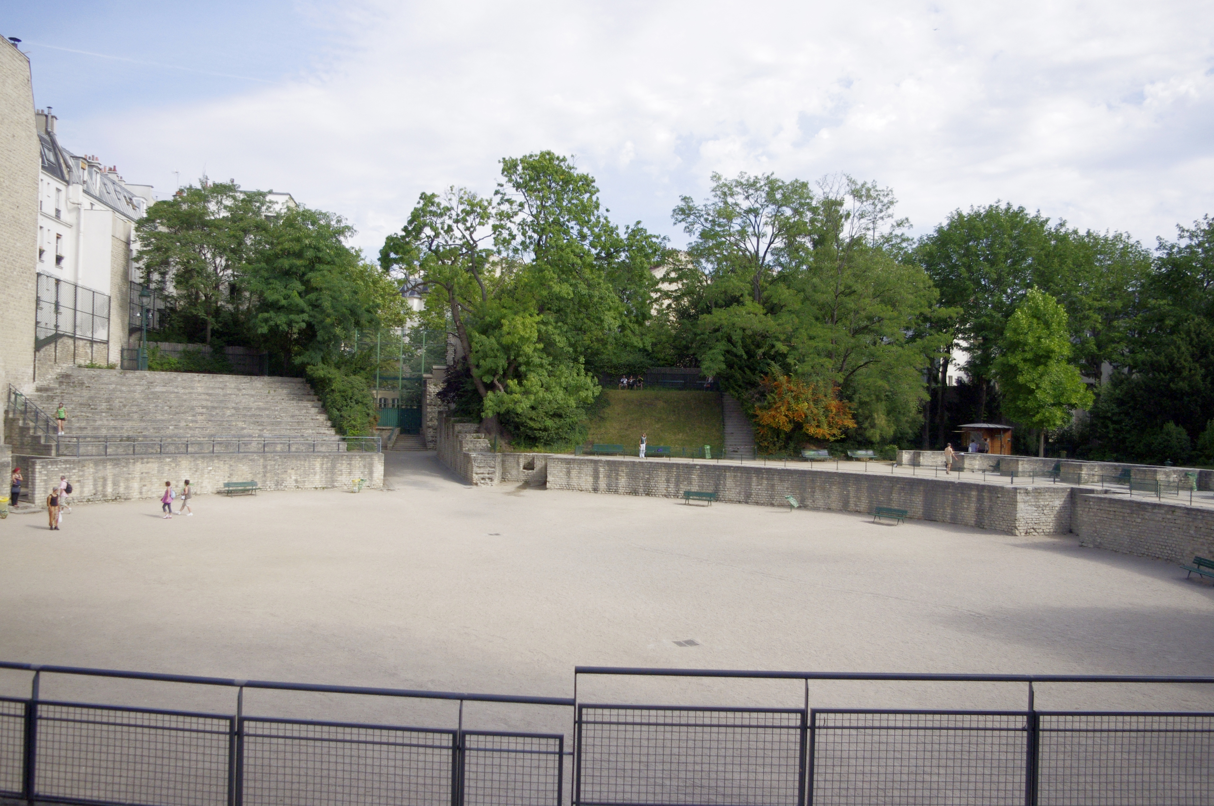 Arènes de Lutèce, Paris